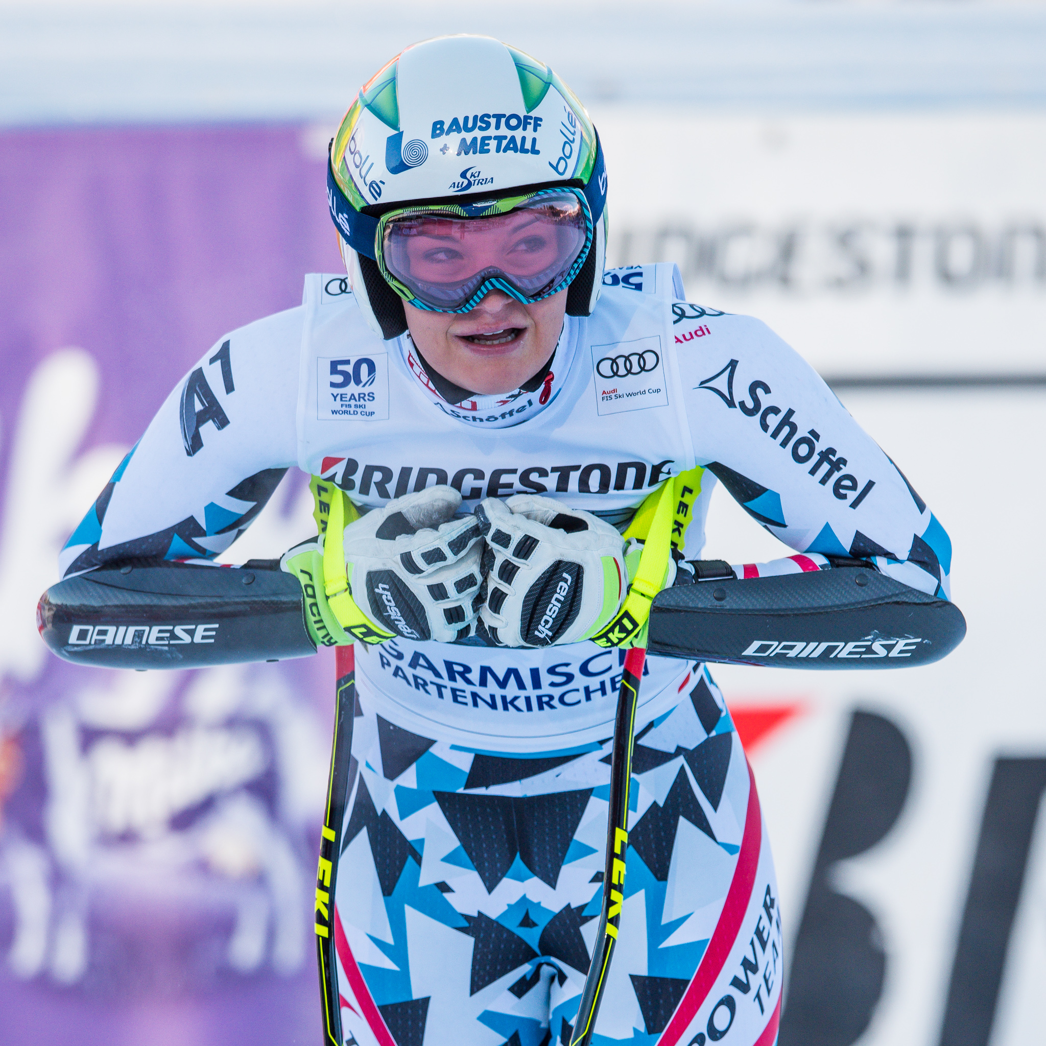 64. Kandahar Rennen,Audi FIS Ski Weltcup Garmisch-Partenkirchen,Damen Super-G,Kandahar,Ladies Super-G,Ramona Siebenhofer